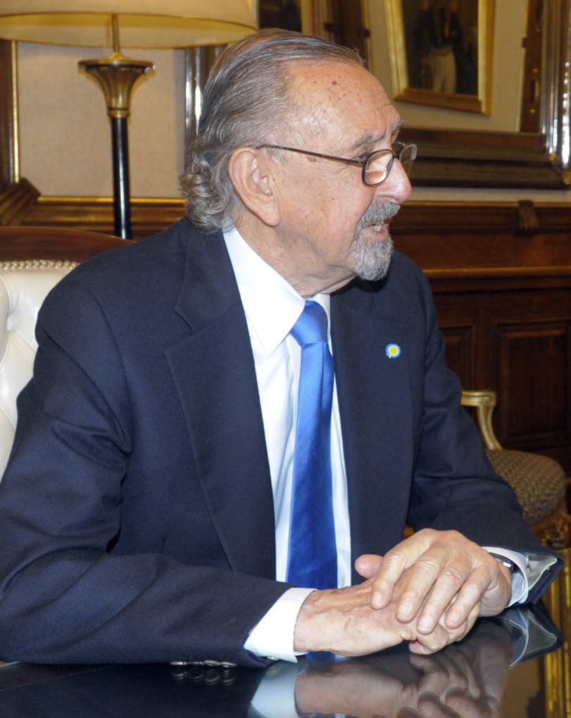 La presidenta Cristina Fernández recibió en audiencia al arquitecto César Pelli. Del encuentro, que se desarrolló en el Despacho Presidencial de Casa Rosada, participó el ministro de Planificación Federal, Inversión Pública y Servicios, Julio De Vido.